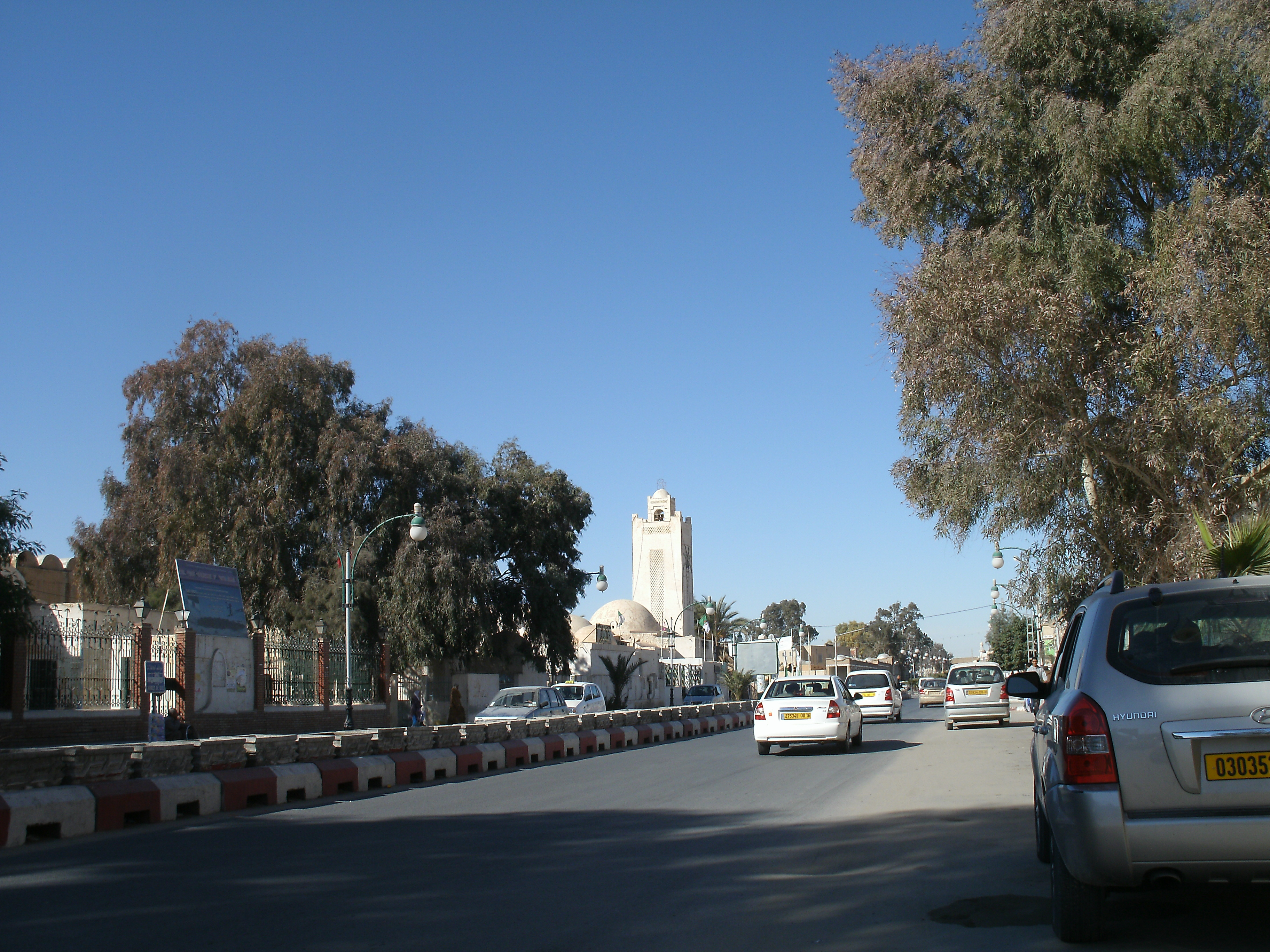 La route nationale 48 à El Oued